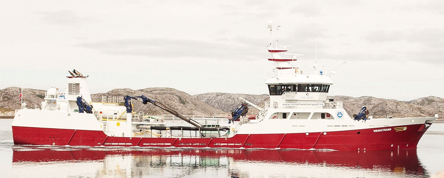 MS «Viknatrans», brønnbåt levert fra Aas Mek. Verksted til Norsk Fisketransport i 2011. Fotografert i Vikna.